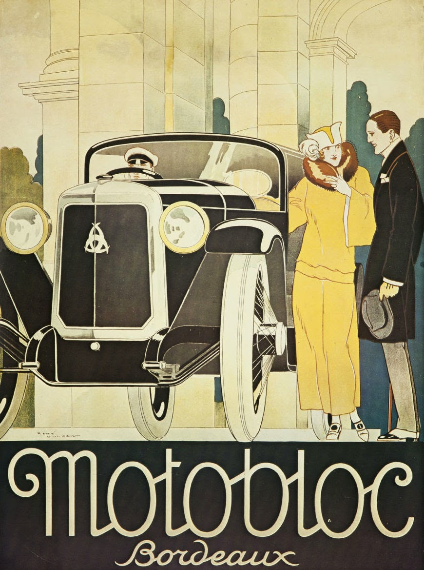 Musée d'Aquitaine BORDEAUX